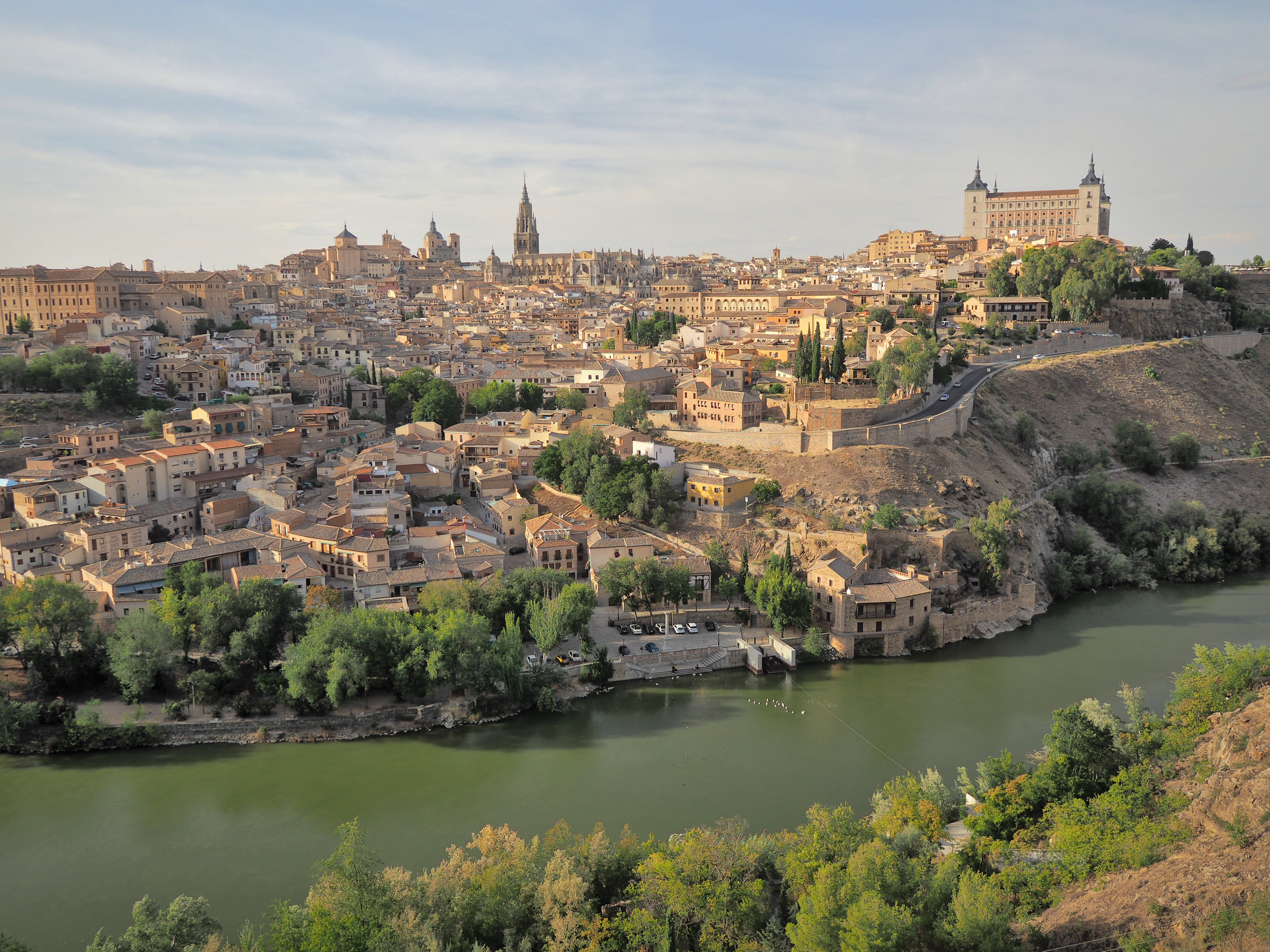 Toledo